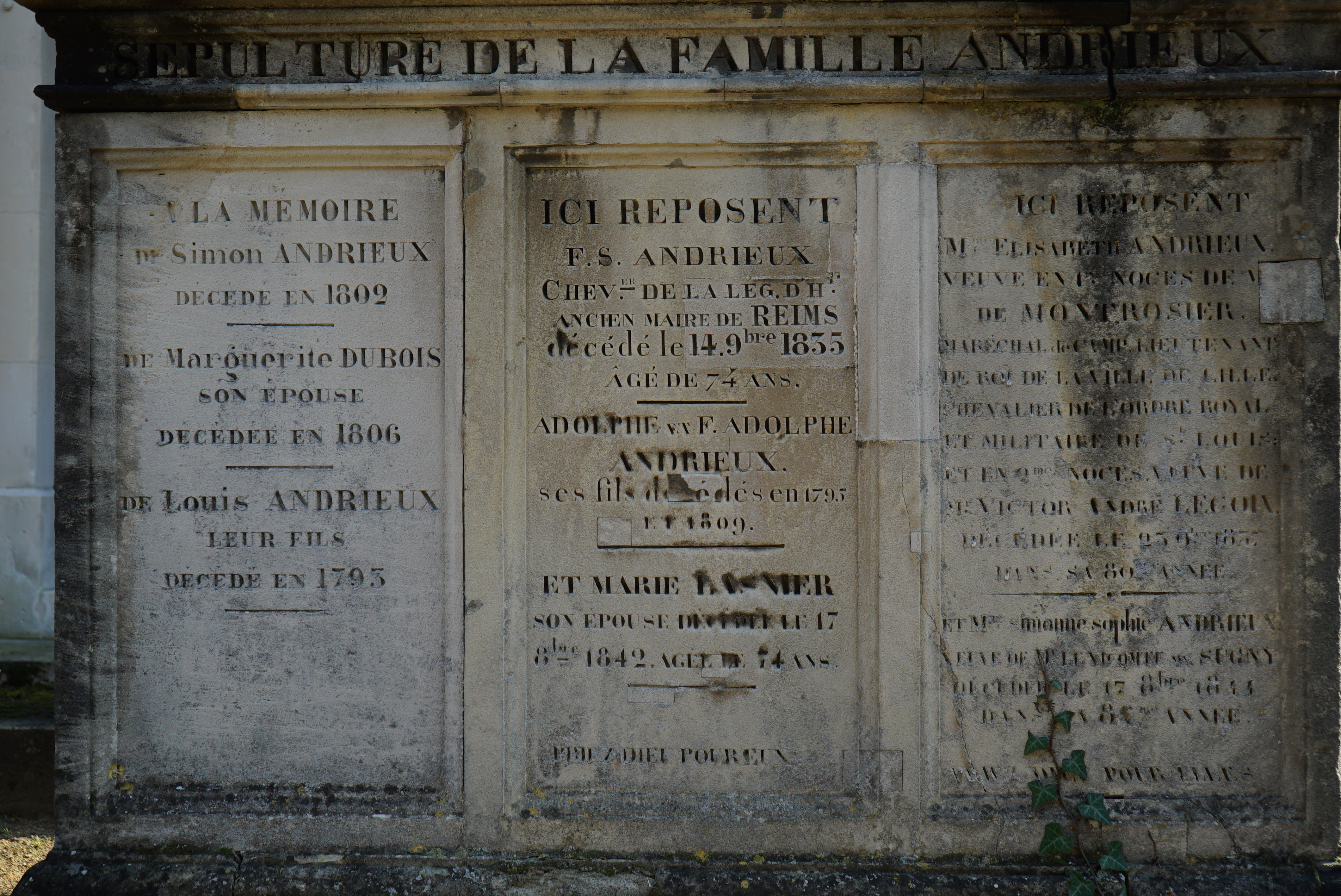 une vue de la Concession Andrieux-Lasnier du canton 2 au cimetière du Nord.